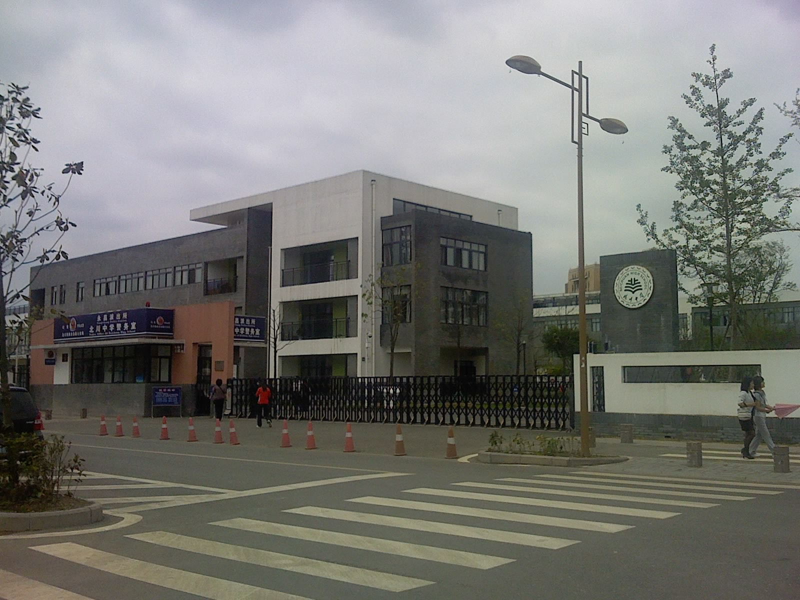 A6 新北川中学 liuzusai